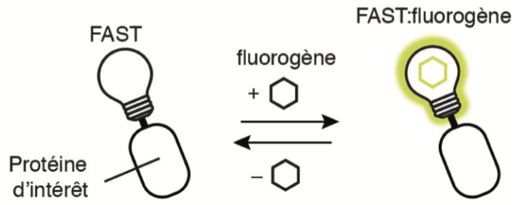 complexation réversible entre FAST et un fluorogène